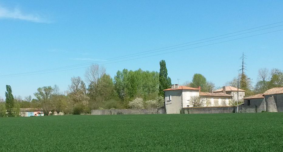 Gautret-Valllans-79-France